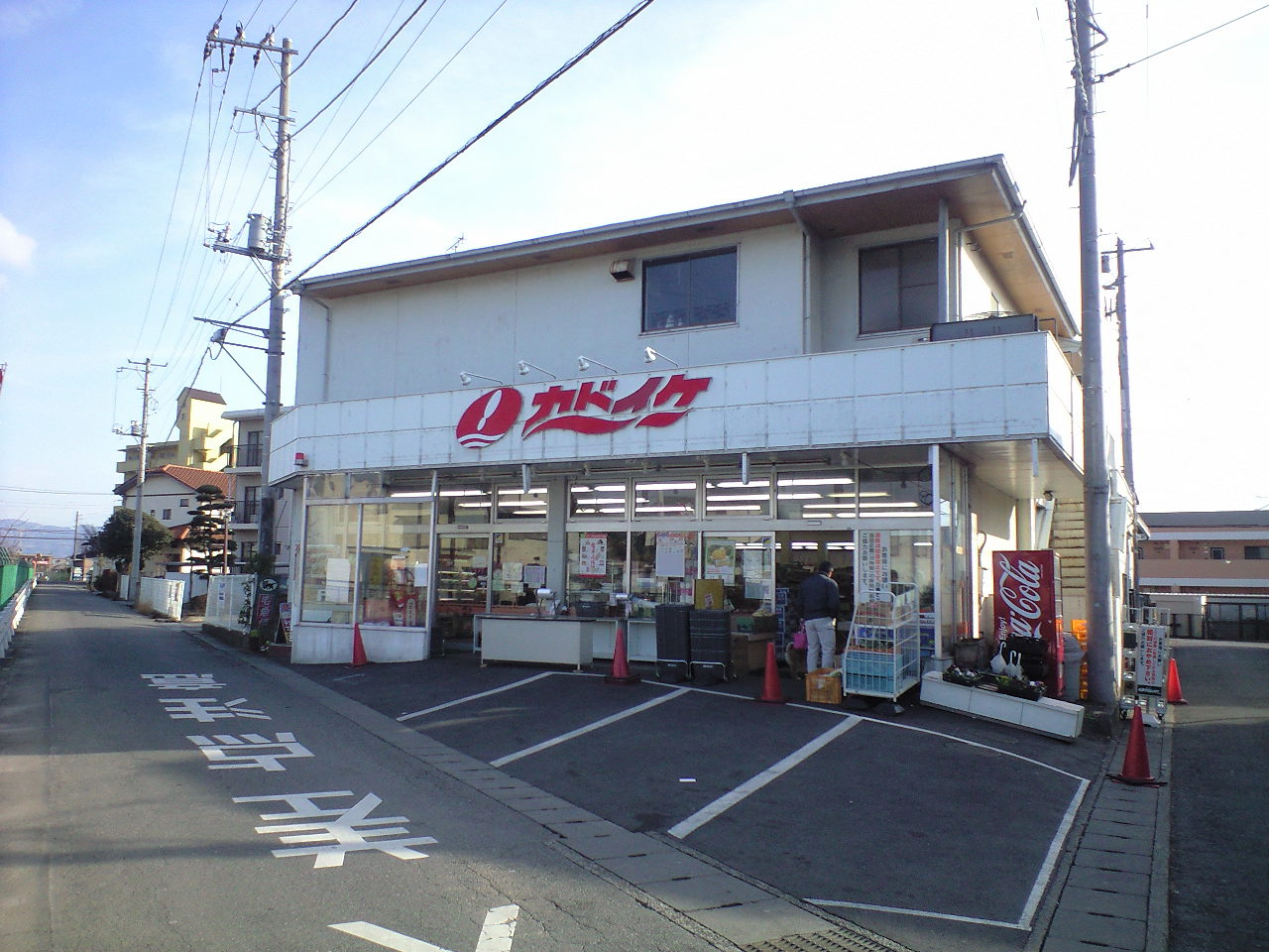 静岡県沼津市大岡、スーパーカドイケ本店